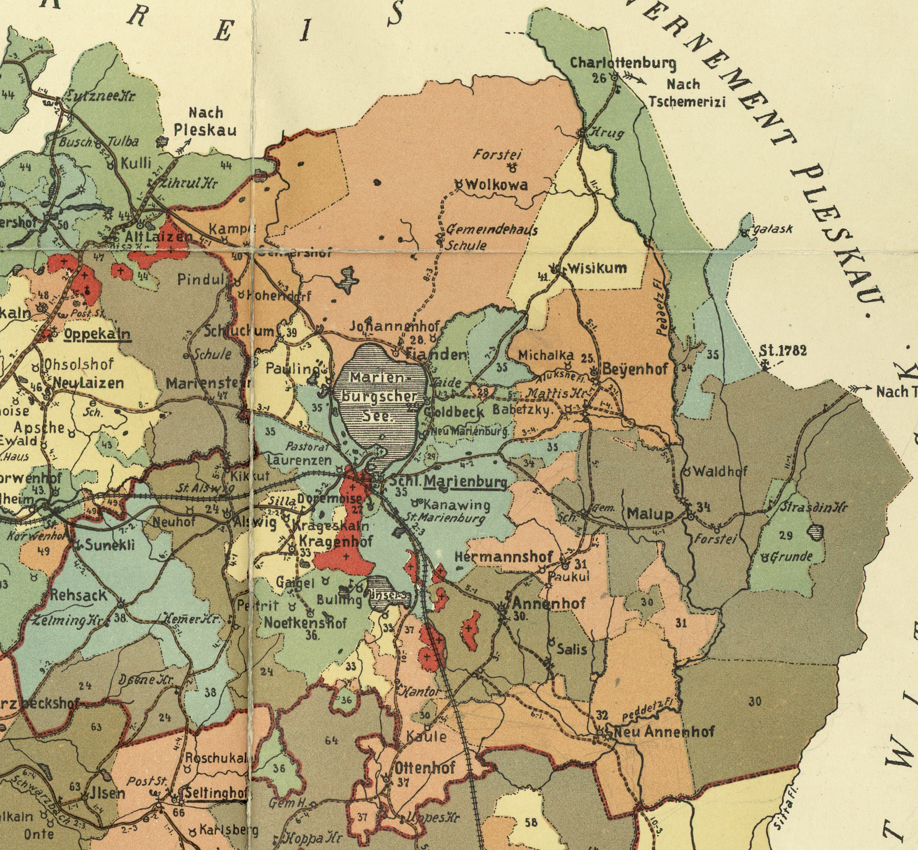 Aluliina kihelkonna mõisad 1904. aasta kaardil.